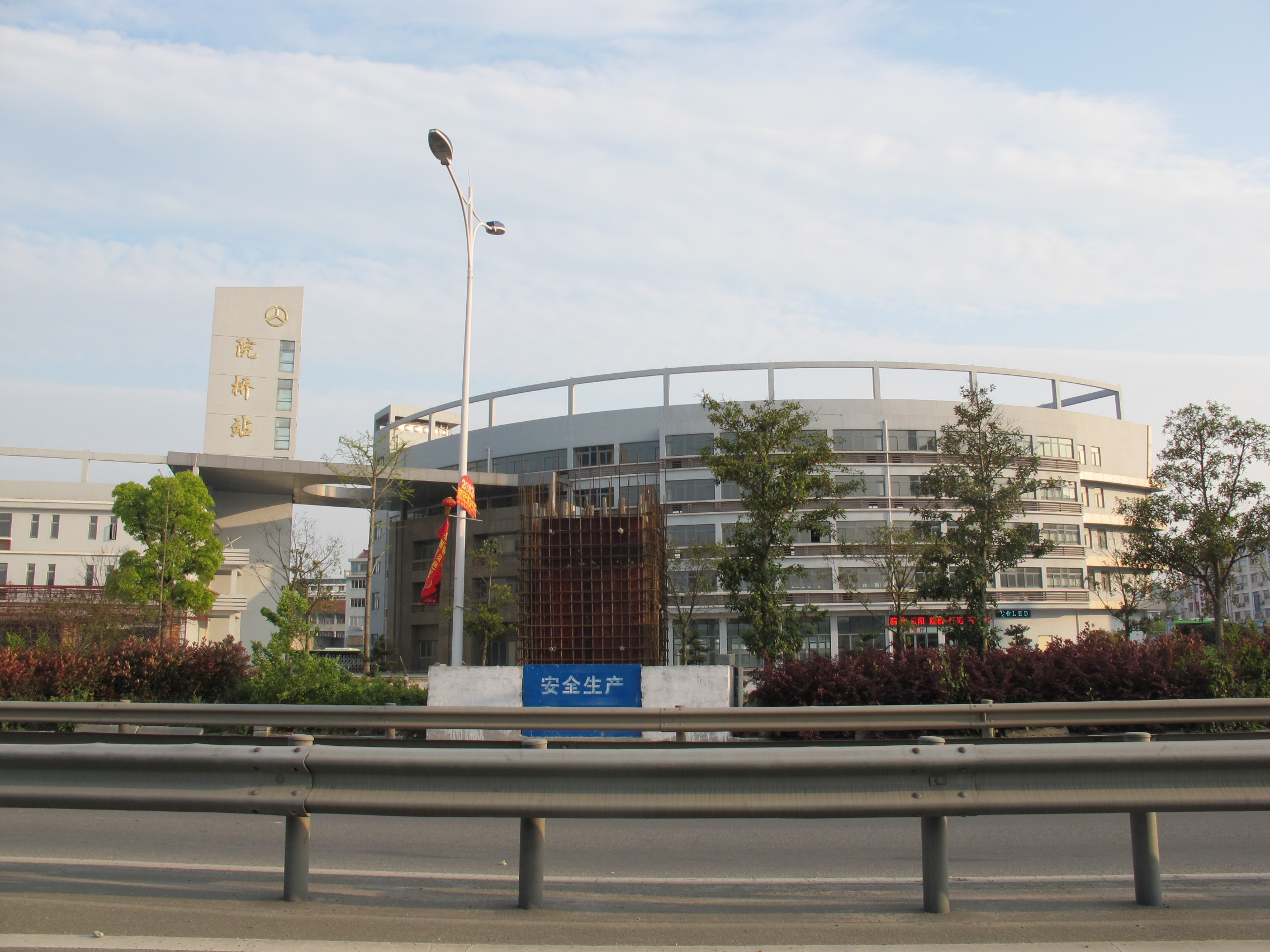 院桥汽车站